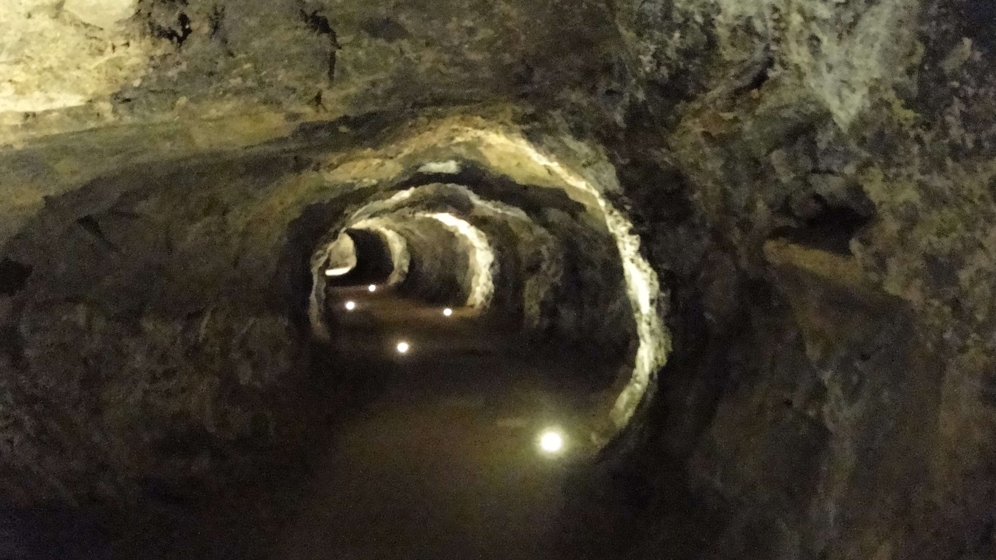 Mina de Mercurio. Almadén (Ciudad Real). Patrimonio de la Humanidad